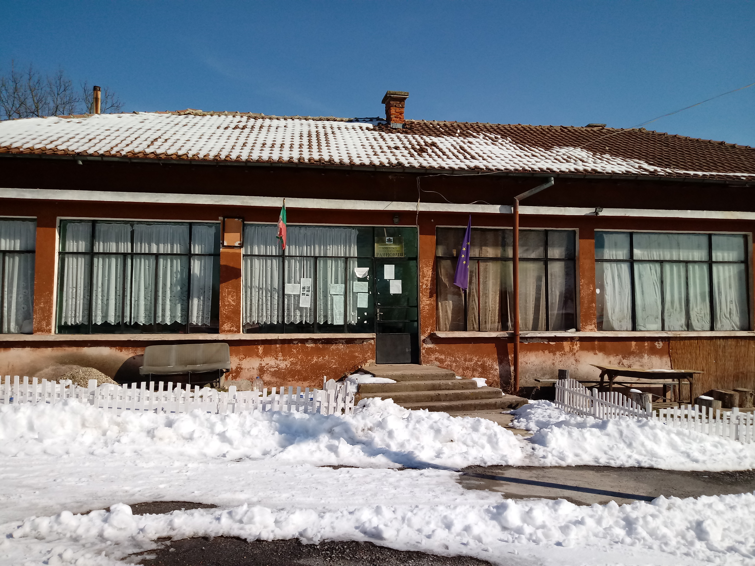 Раяновци - кметско наместничество